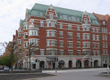 Bostadshus vid Triangeln, Malmö